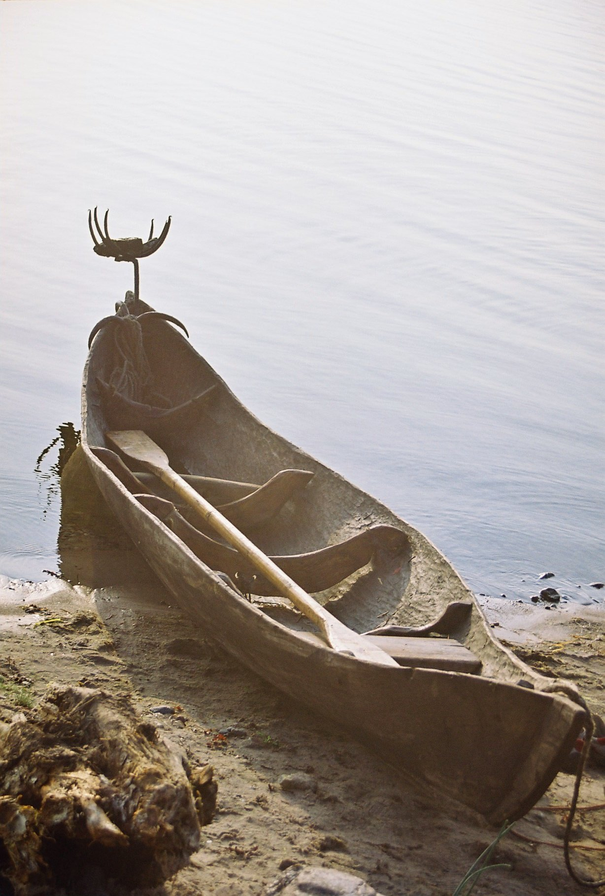 haabjas Käsmus, 2006